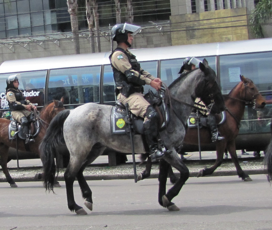 Policiamento de choque da PMPR.